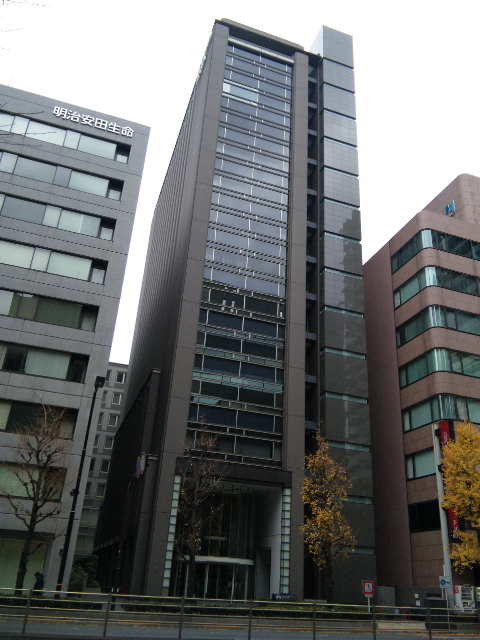 メディパルホールディングス本社である八重洲二丁目共同ビル